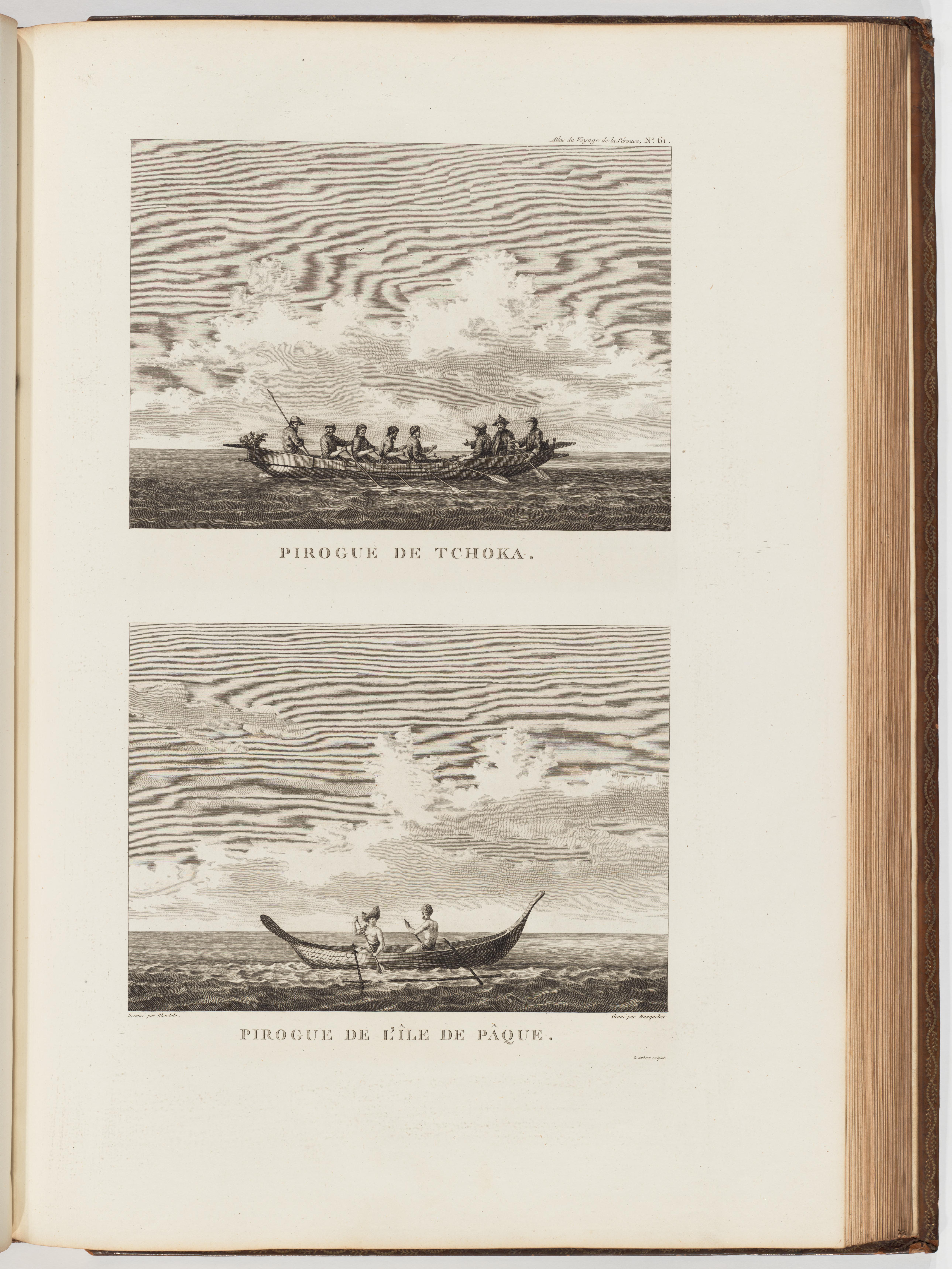 Voyage de La Pérouse autour du monde /publié conformément au décret du 22 avril 1791, et rédigé par L.A. Milet-Mureau.